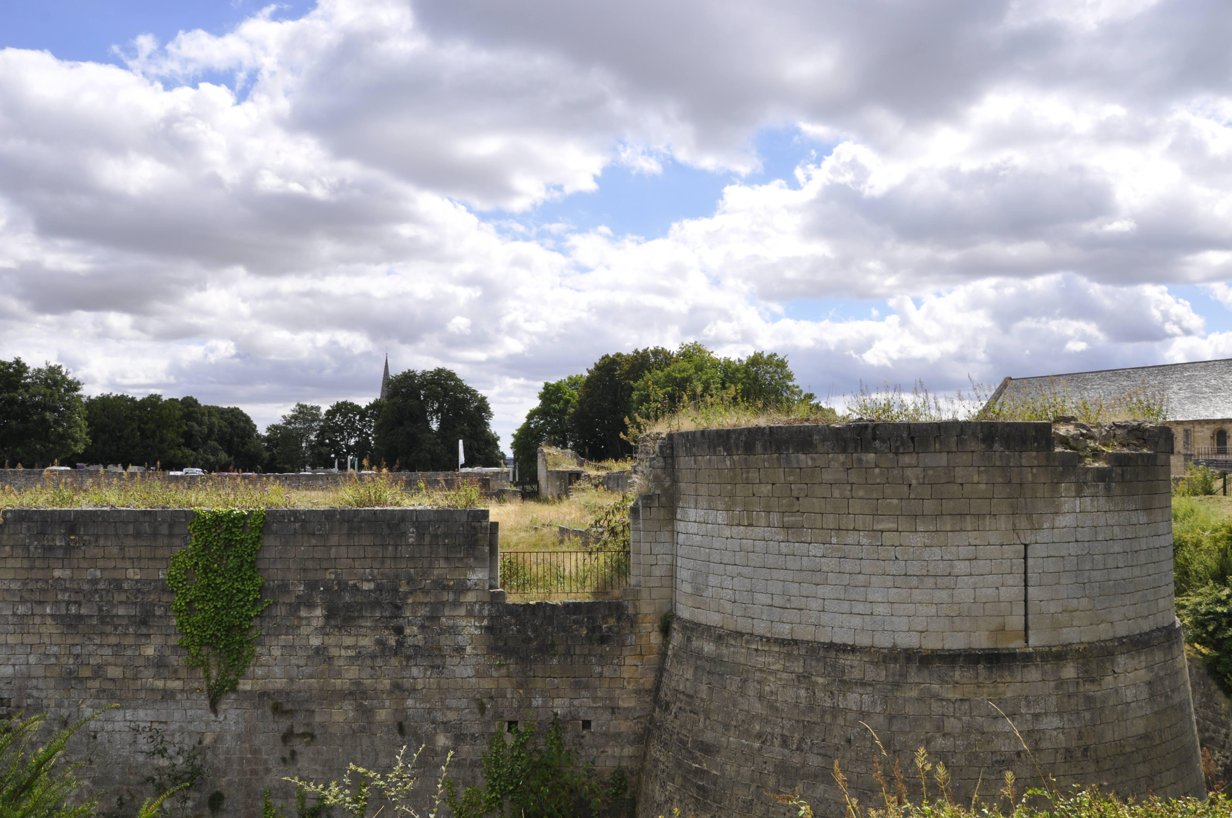 accès à la garenne du château de Caen au nord du château ; l'entrée primitive du château (tour-porte) se trouvait à l'arrière de la tour de droite.